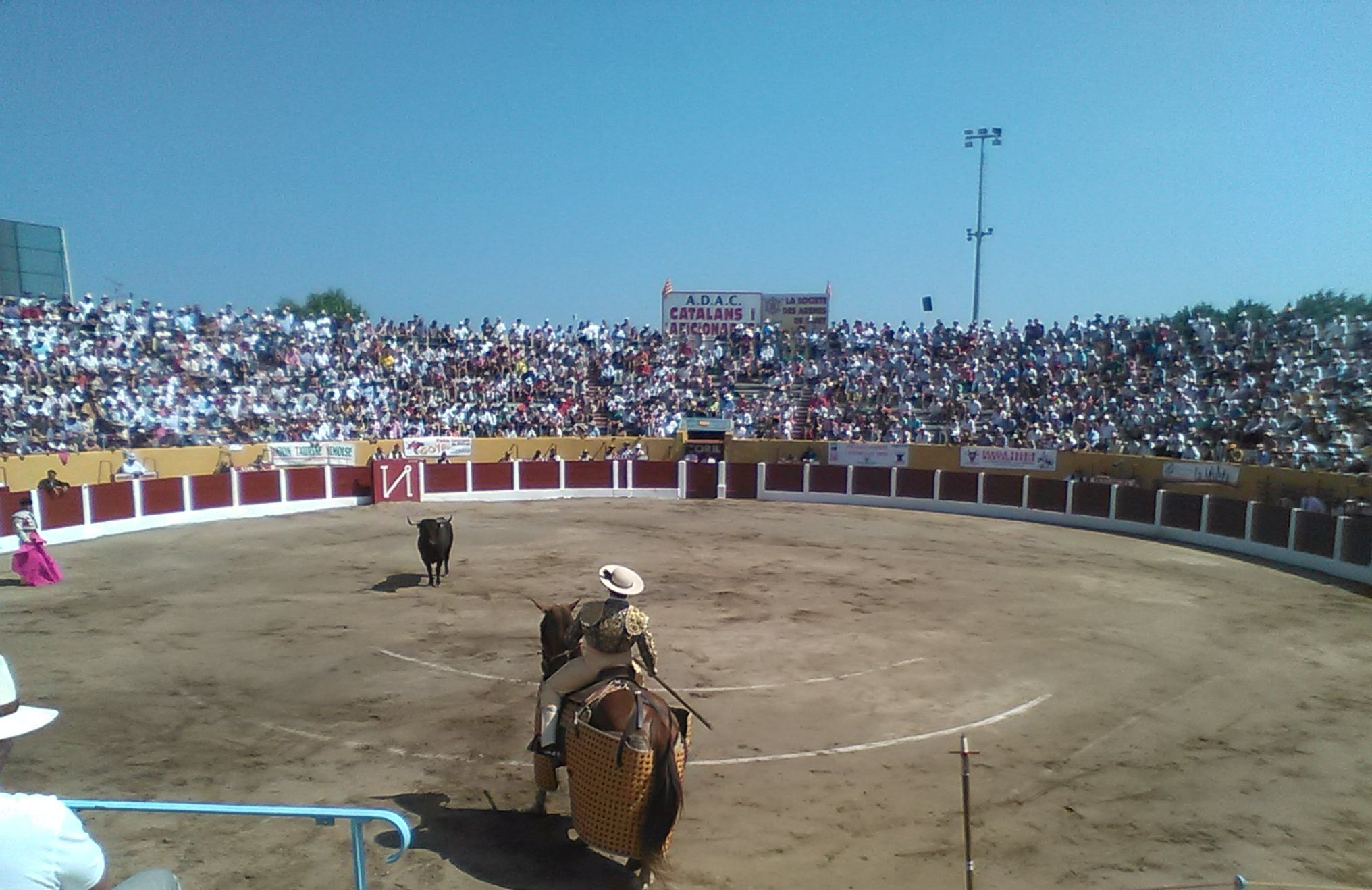 Picador et premier toro lors d'une corrida à Céret en 2015